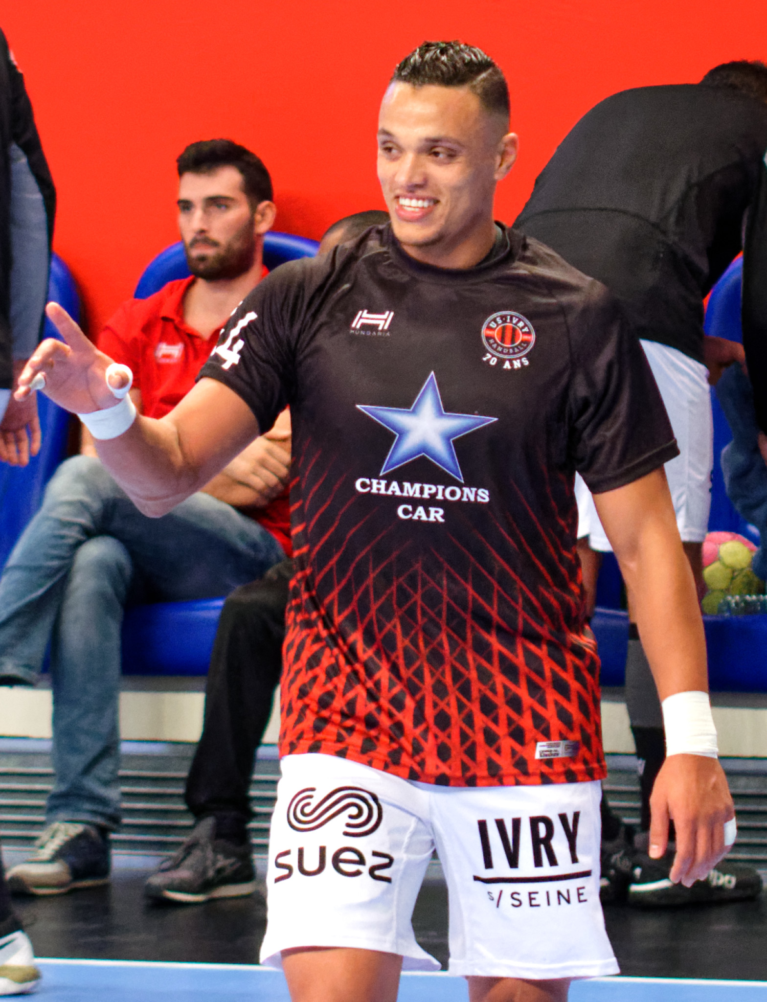 Rencontre de championnat entre le PSG et l'US Ivry A coubertin, le 14 septembre 2017.